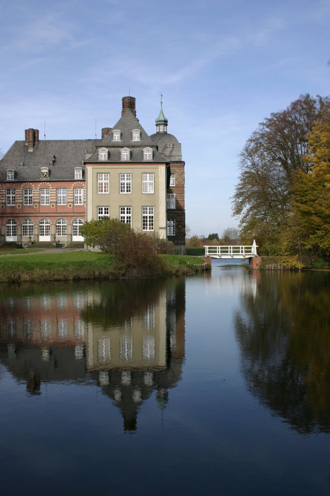 Schloss-Hovestadt, Lippetal